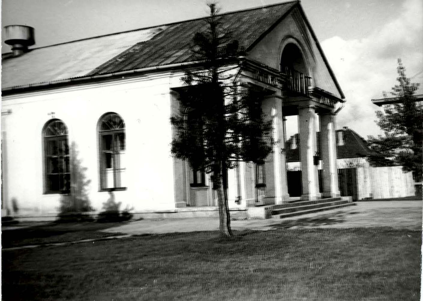 Vana foto Keilast.